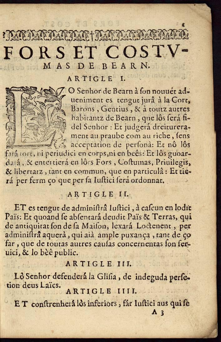 Nouveau For de Béarn, édition 1625.